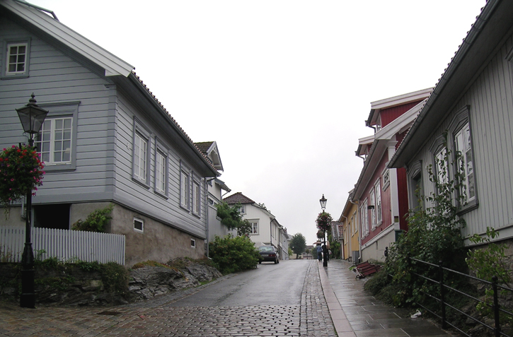 Bratsberggata, Skien, Norway.